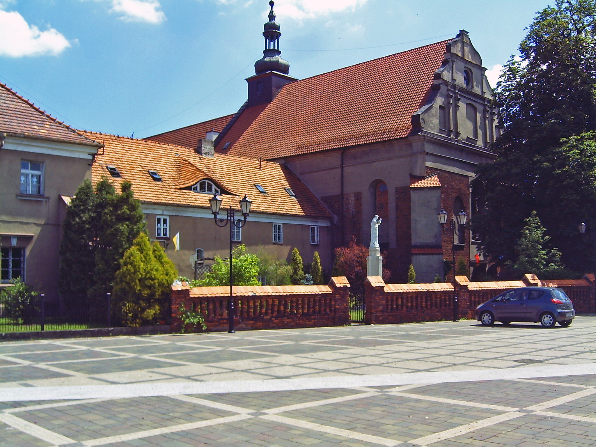 Sieradz, ul. Dominikańska 16 - kościół p.w. św. Stanisława, w zespole klasztornym dominikanów, obecnie urszulanek, mur., poł. XIII, 1594-1596, XVIII (zabytek nr 54/842 z 28.12.1967)